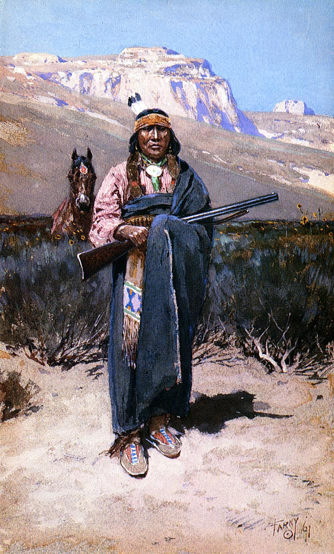 Indian Brave